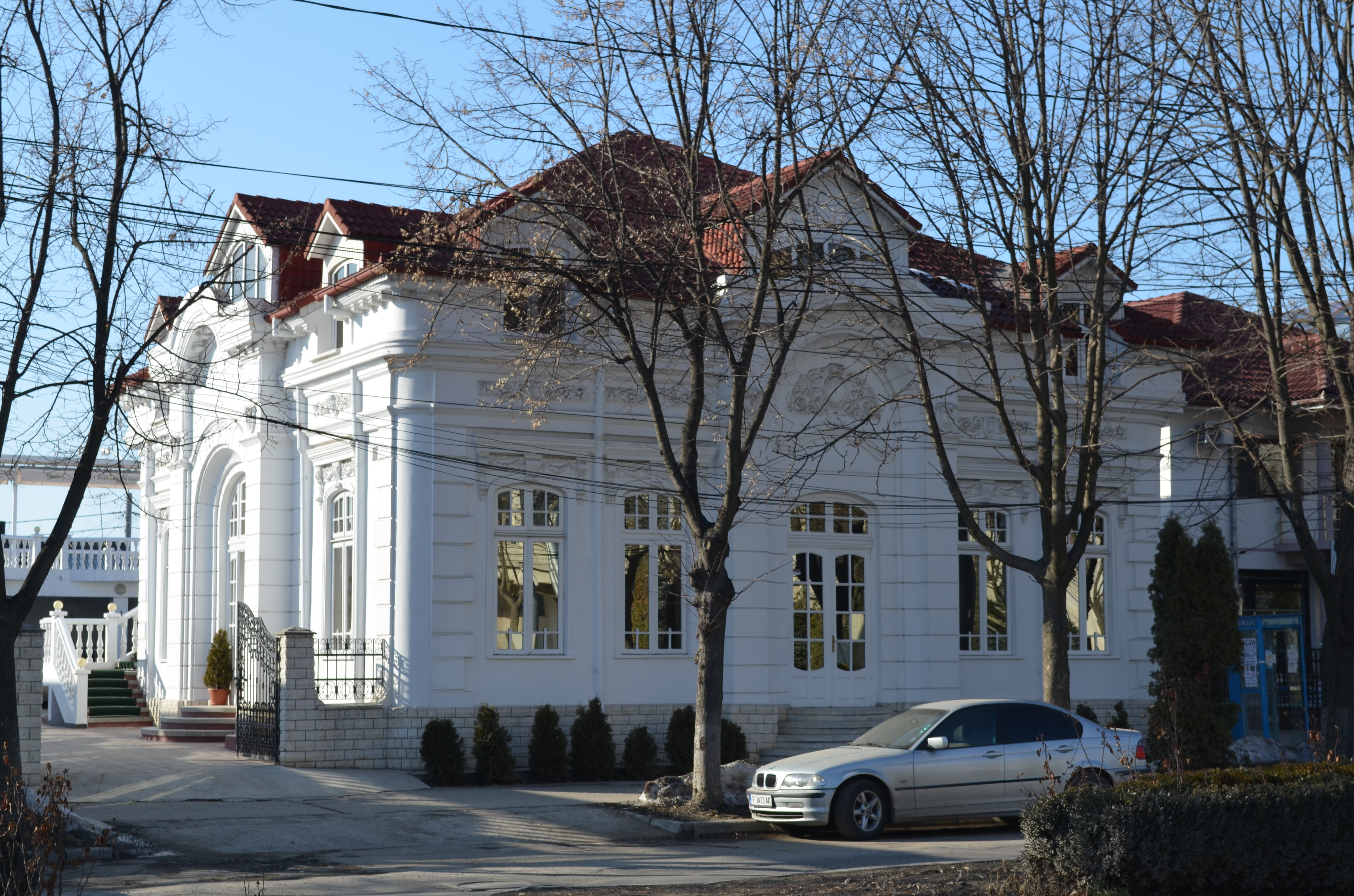 Casa Mâdârjac, azi restaurant "Casa Albă" (Str. Ștefan cel Mare nr. 43, Vaslui)